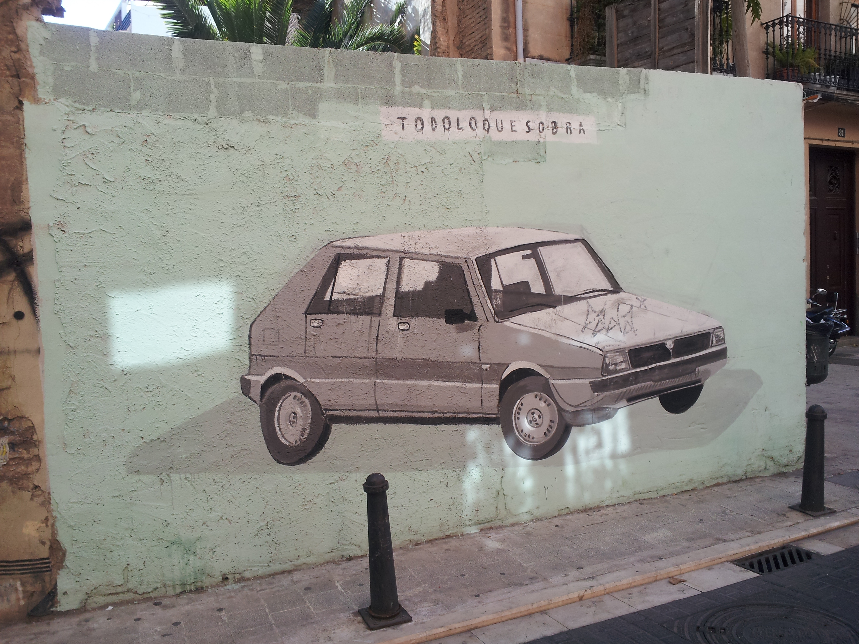 Graffiti "Todo lo que sobra", amb el Lancia Delta de Rita Barberà, projecte de la Falla Mossén Sorell - Corona per a 2015.